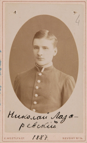 В 1887 г. Николай Лазаревский окончил гимназию и поступил на юридический факультет Санкт-Петербургского Императорского университета.